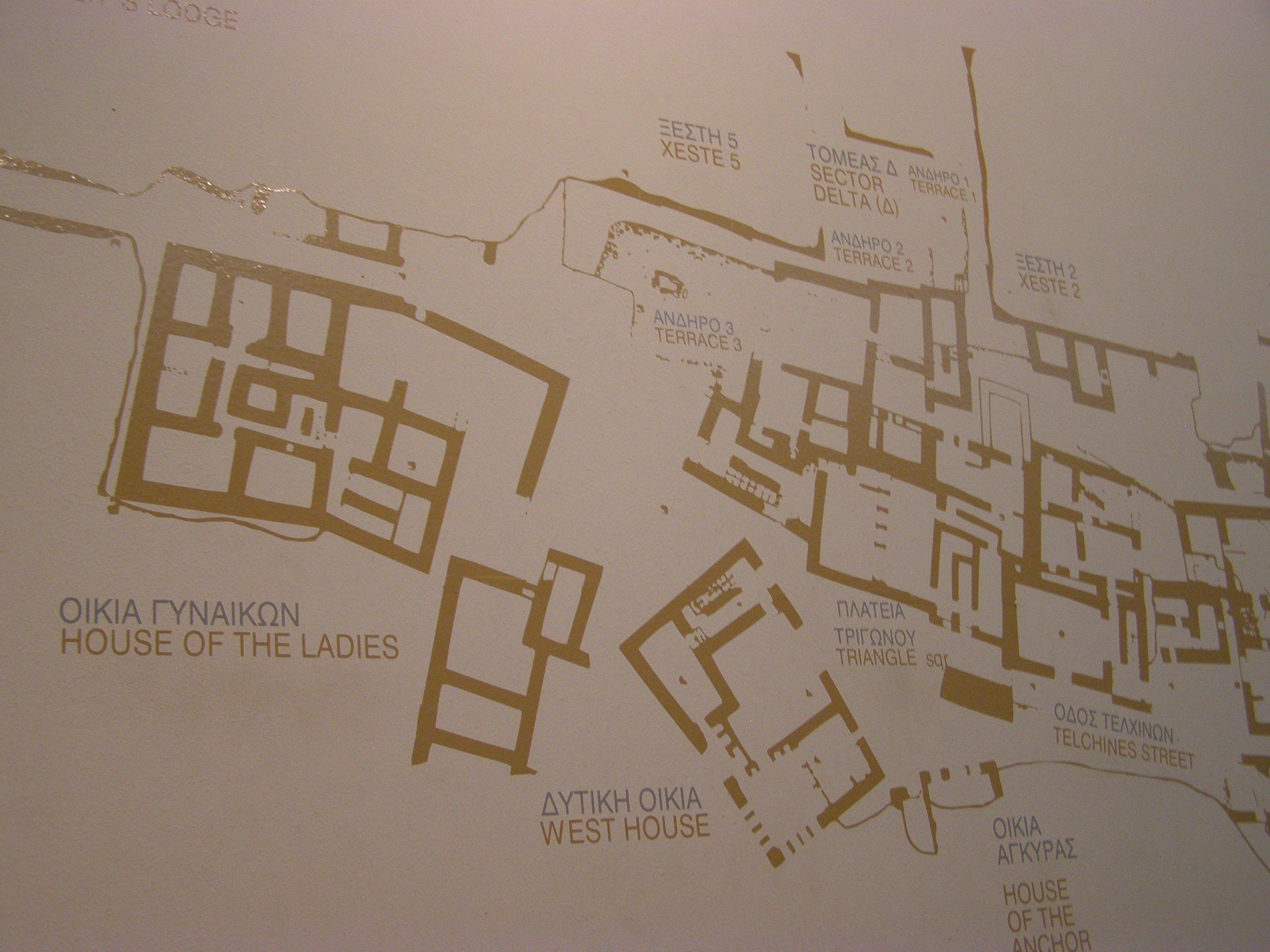 Plánek s umístěním Západního domu a Domu žen